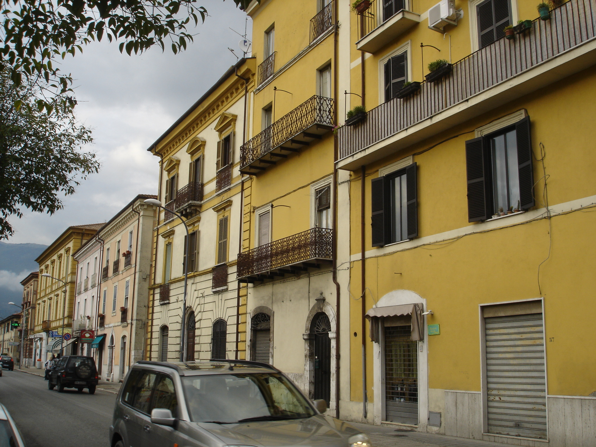 Quartieri operai in via Borgonuovo, Isola del Liri